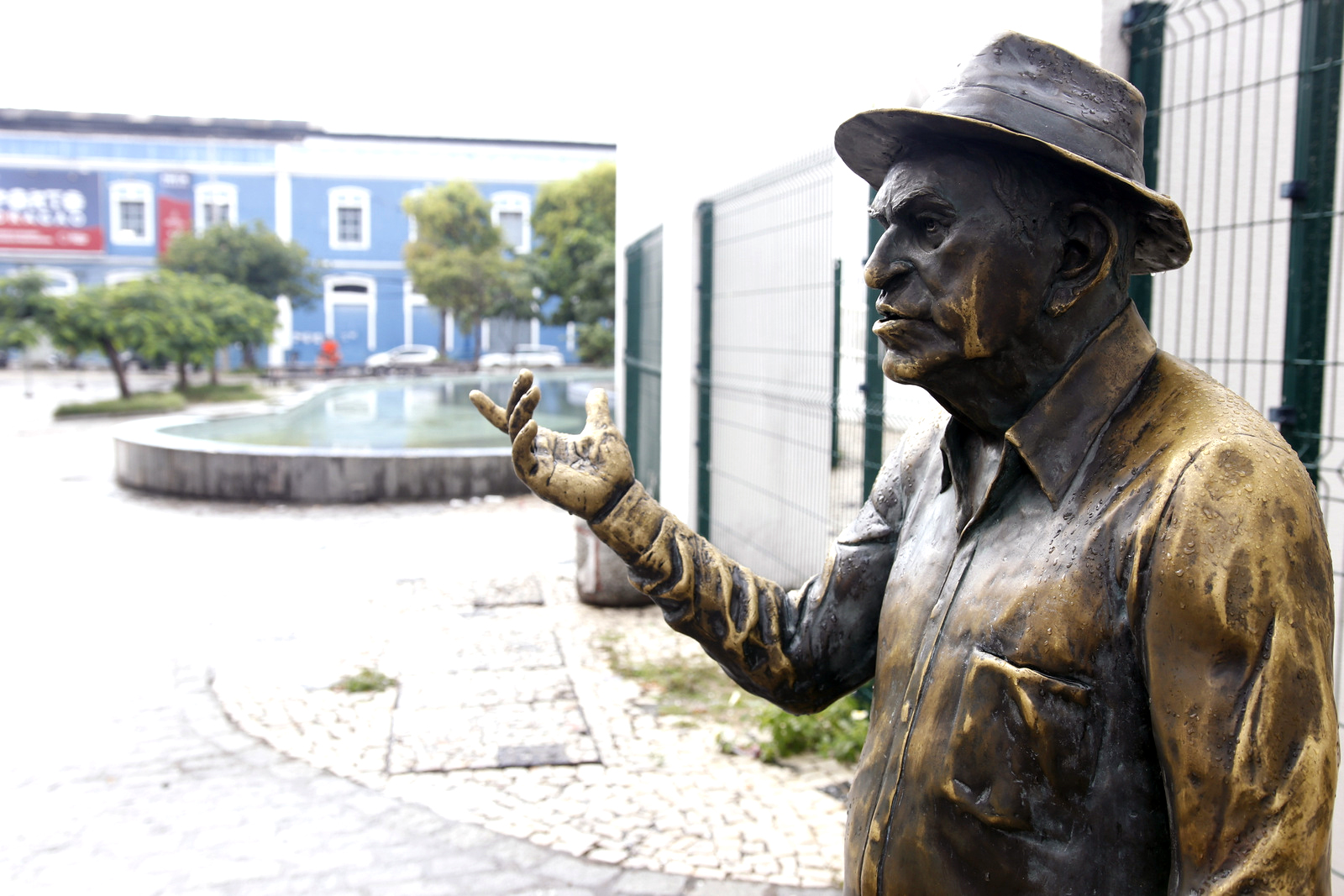 O Ministério da Cultura (MinC) realizou, nesta sexta-feira (6), em Fortaleza (CE), o Circuito #CulturaGeraFuturo, que tem por objetivo ampliar o alcance da política cultural e dos instrumentos de fomento à cultura do Governo Federal. Artistas, produtores culturais, gestores públicos e incentivadores participaram do evento, que foi aberto pela ministra interina da Cultura, Mariana Ribas, no Teatro do Centro Dragão do Mar de Arte e Cultura. O Circuito vai acontecer entre abril e julho. Equipes do Ministério da Cultura (MinC) estarão nas 27 capitais brasileiras, levando orientações sobre a Lei Rouanet, a Lei do Audiovisual, o Fundo Setorial do Audiovisual (FSA) e outras oportunidades. Haverá também um módulo voltado para patrocinadores. A capital cearense é a segunda cidade a receber o evento. A abertura foi na última segunda (2), em Macapá (AP). 06.04.2018 Fotos: Ronaldo Caldas/Ascom/MinC